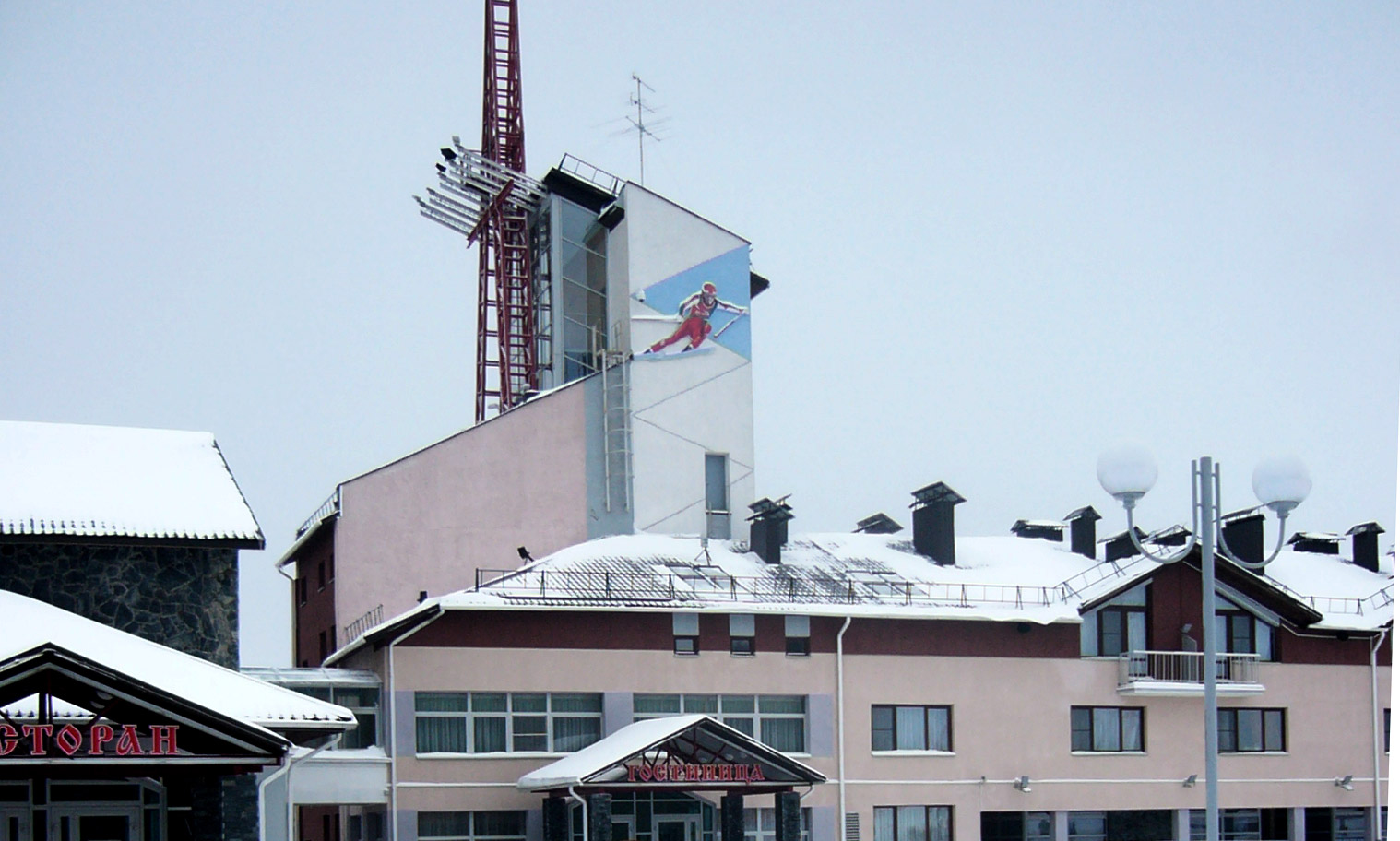 "Silichy" ski resirt in Belarus